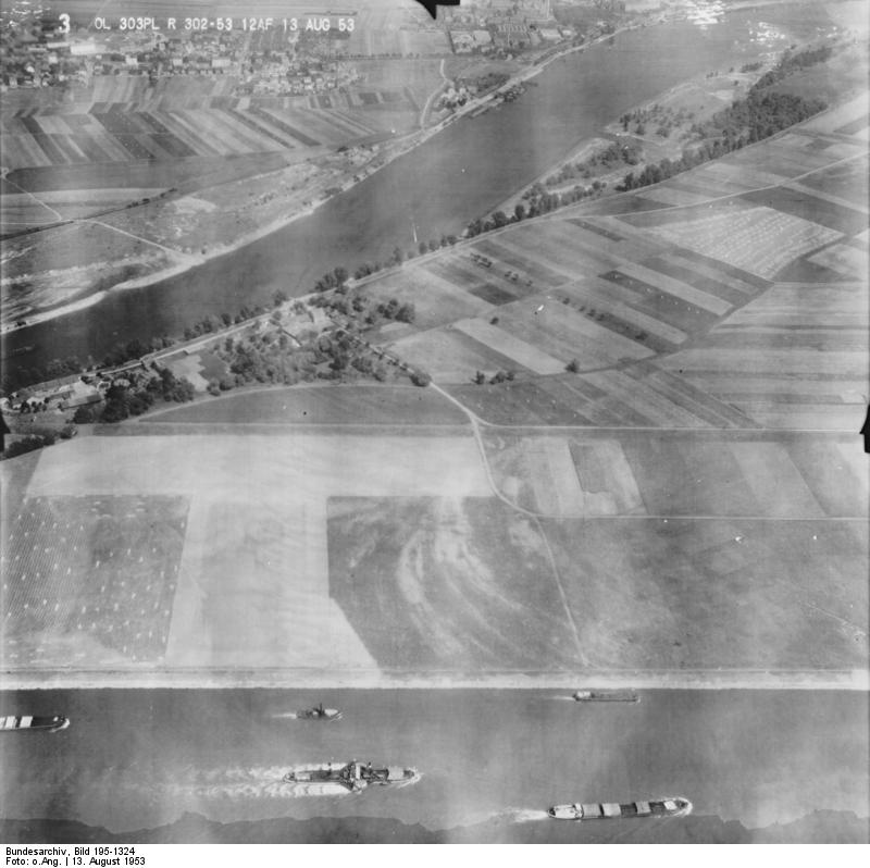 Rheinbefliegung der Alliierten 1953